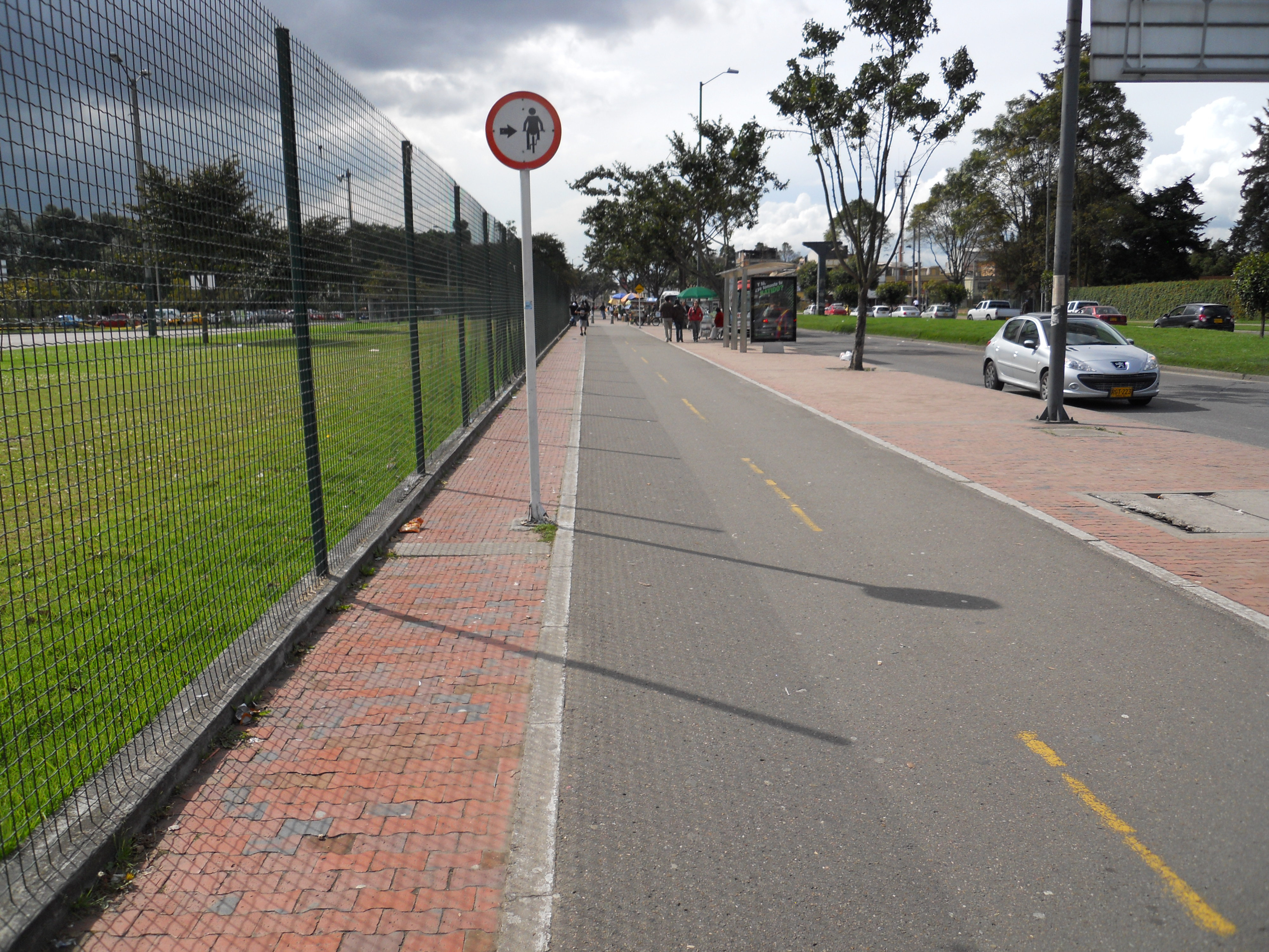 Cicloruta en el costado sur de la avenida 63.